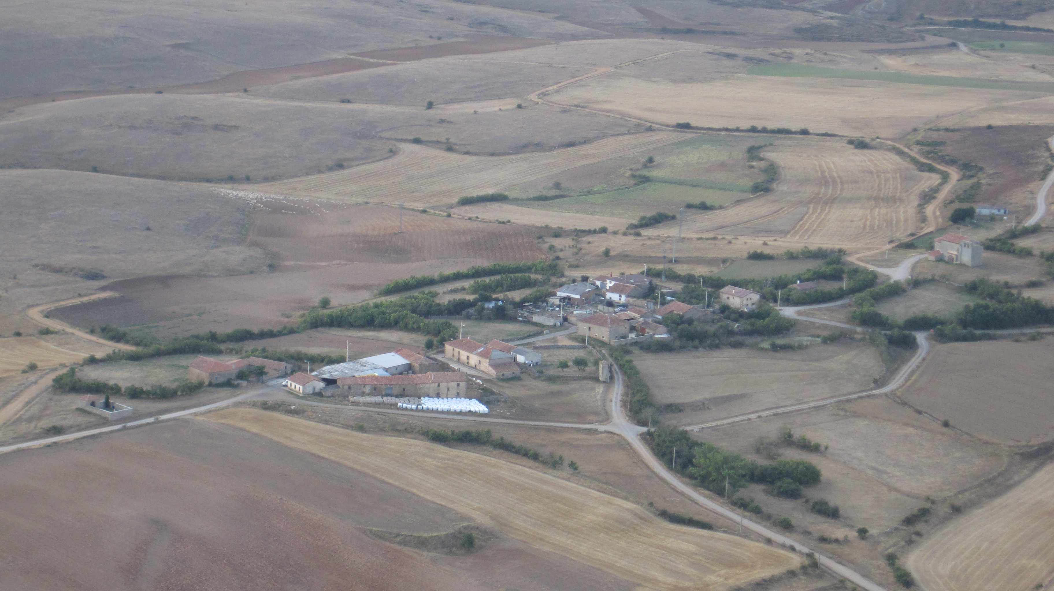 Vista aérea de Matalbaniega (Aguilar de Campoo, Palencia, España).